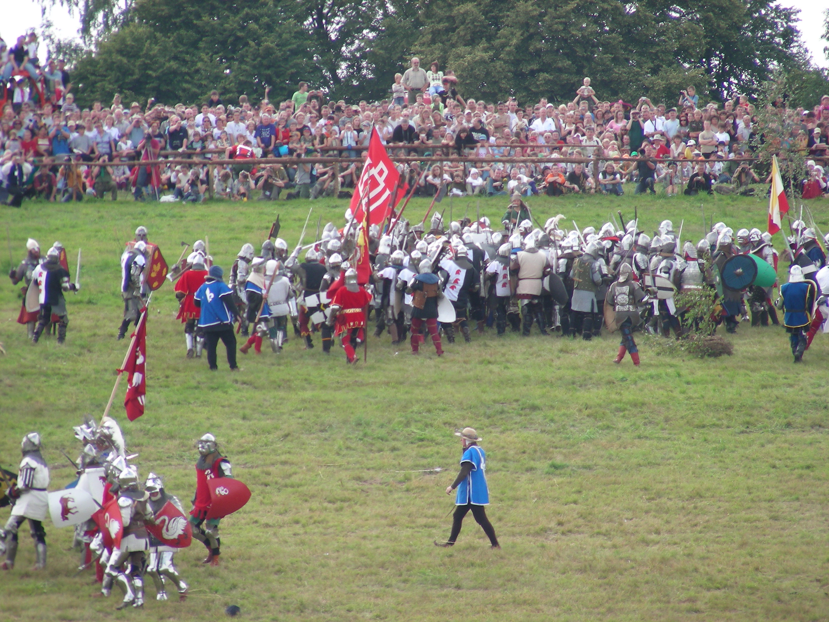 bitwa